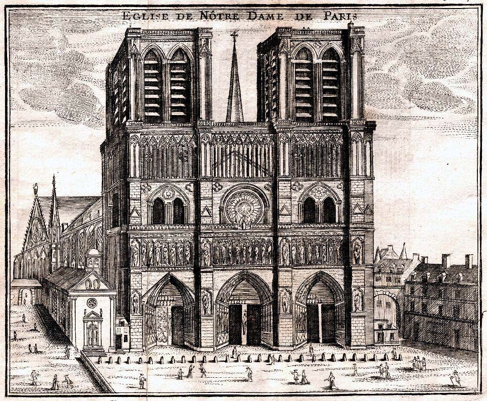 Alte Ansicht von Notre Dame de Paris 1776; aus eigenem Besitz